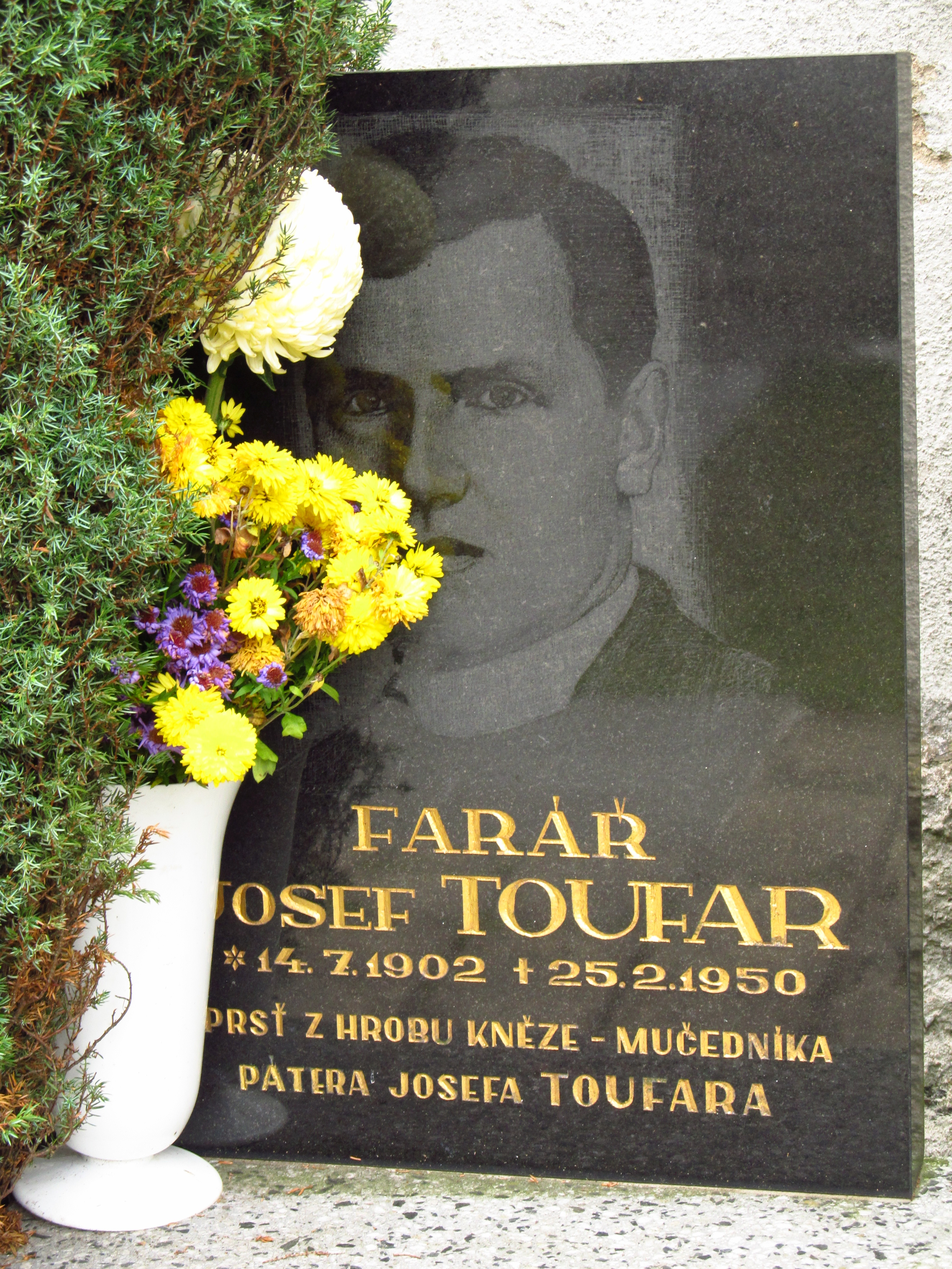 Kostel Nanebevzetí Panny Marie, jižní konec návsi, Číhošť.